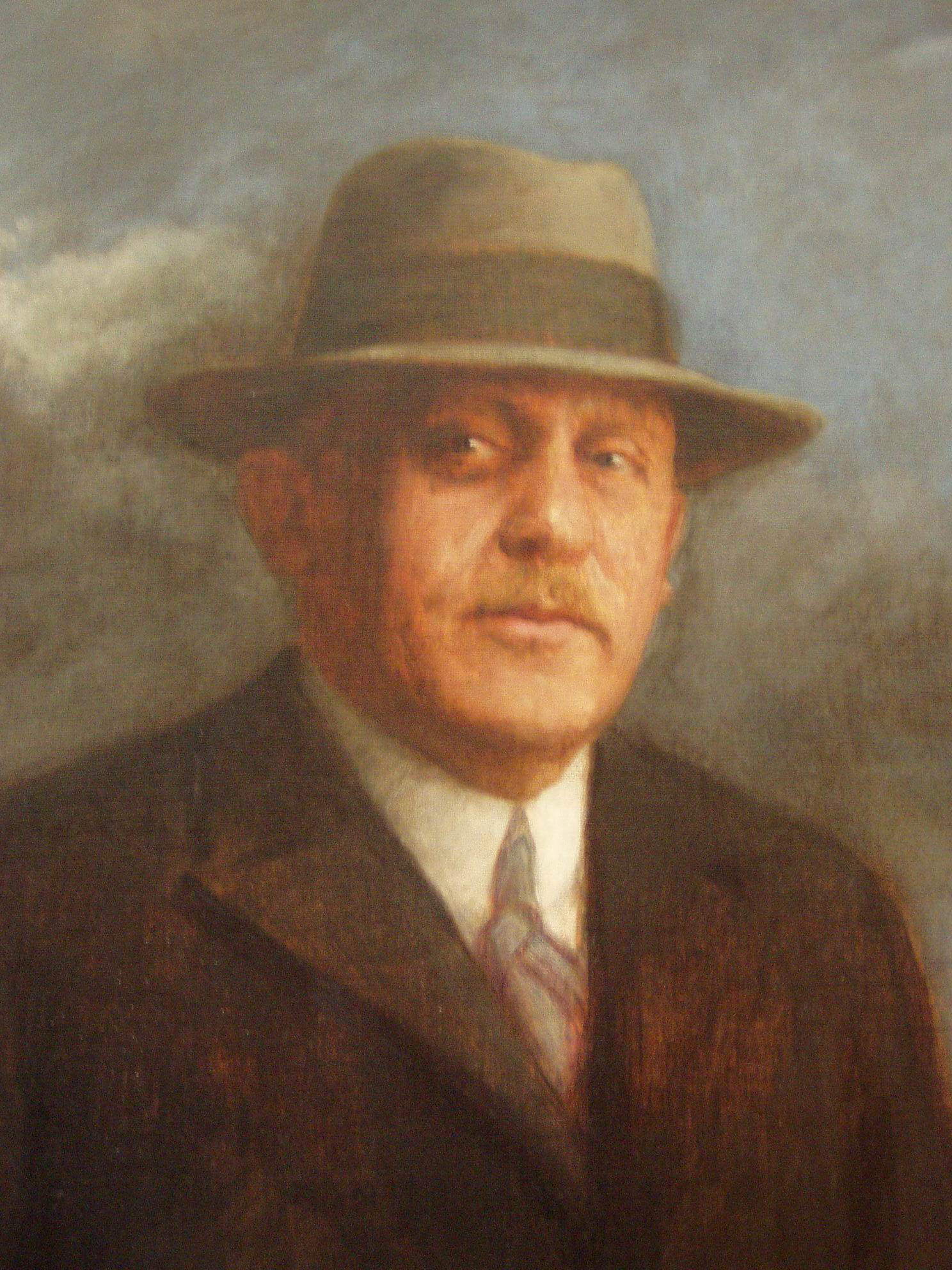 Goldberger Leó arcképe (Glatter Gyula festménye)